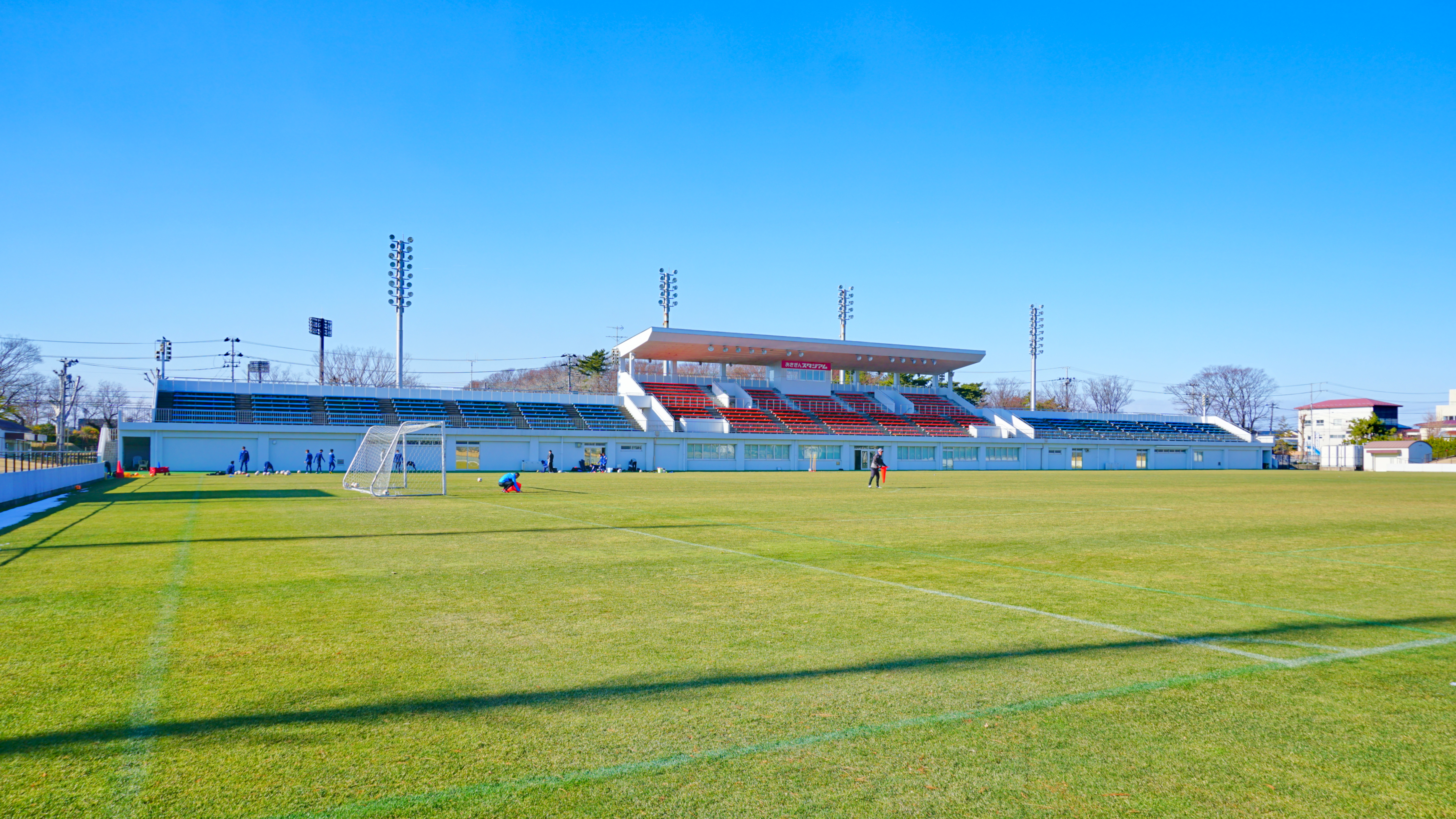 秋田市八橋運動公園球技場（あきぎんスタジアム）フィールド